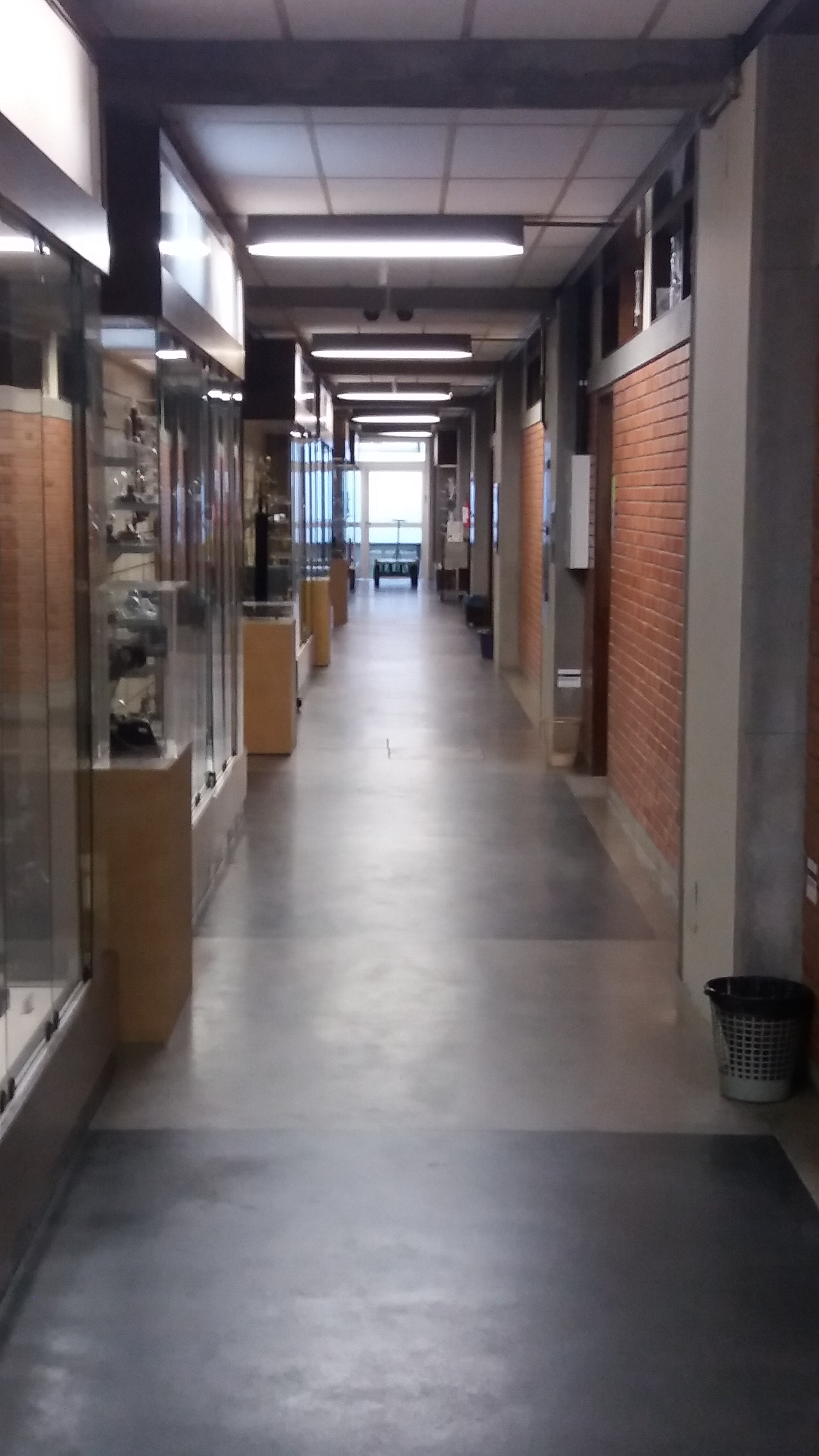 Corredor do prédio de laboratórios do Instituto de Física da Universidade Federal do Rio Grande do Sul.